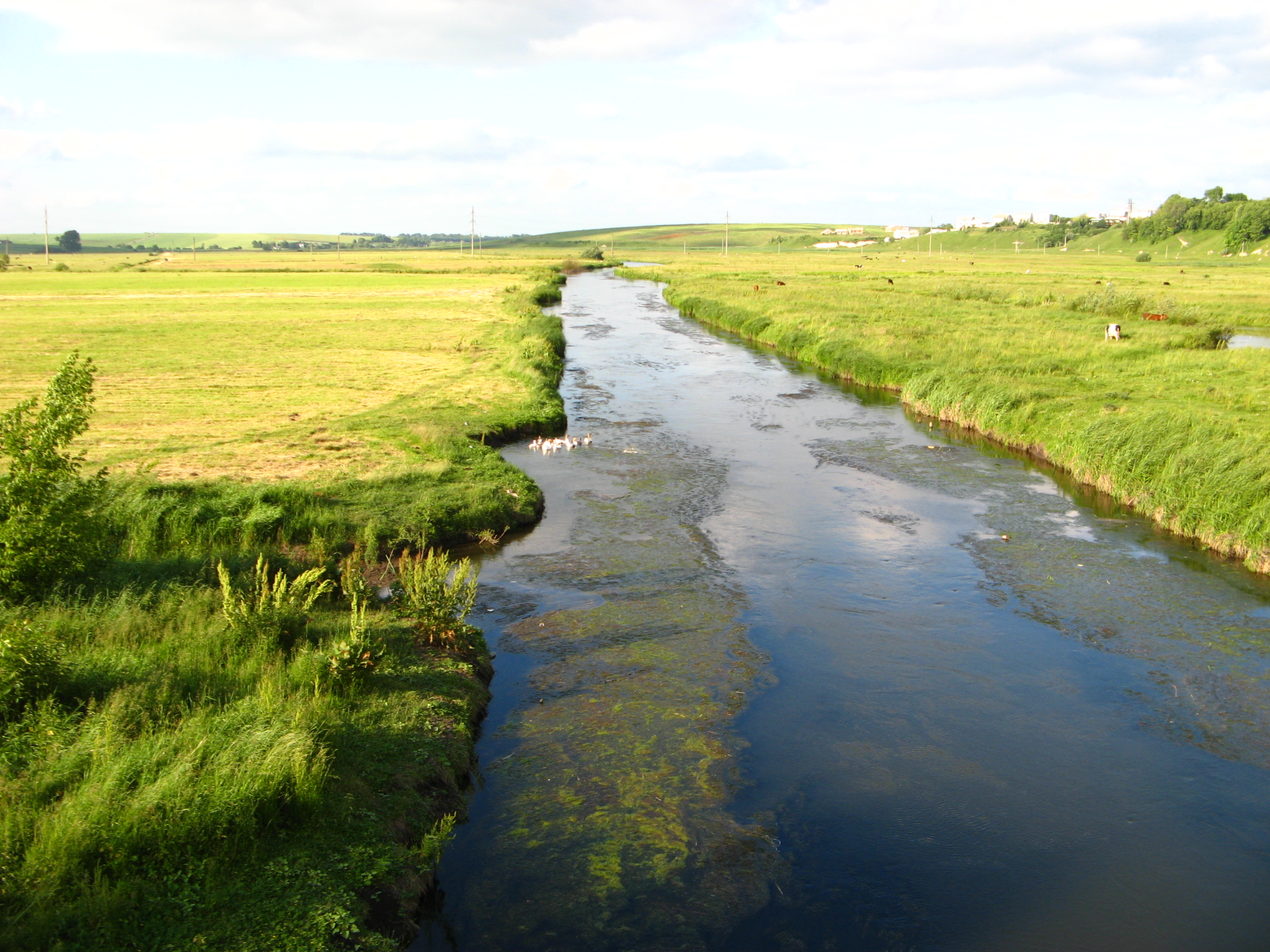 Збруч біля Підволочиська